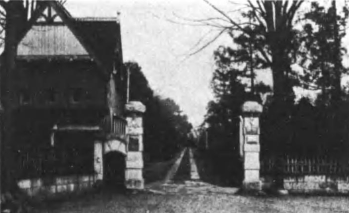 片倉製絲紡績考査課編輯『片倉製絲紡績株式會社創立二十年紀念寫真帖』片倉製絲紡績考査課、1941年3月12日。